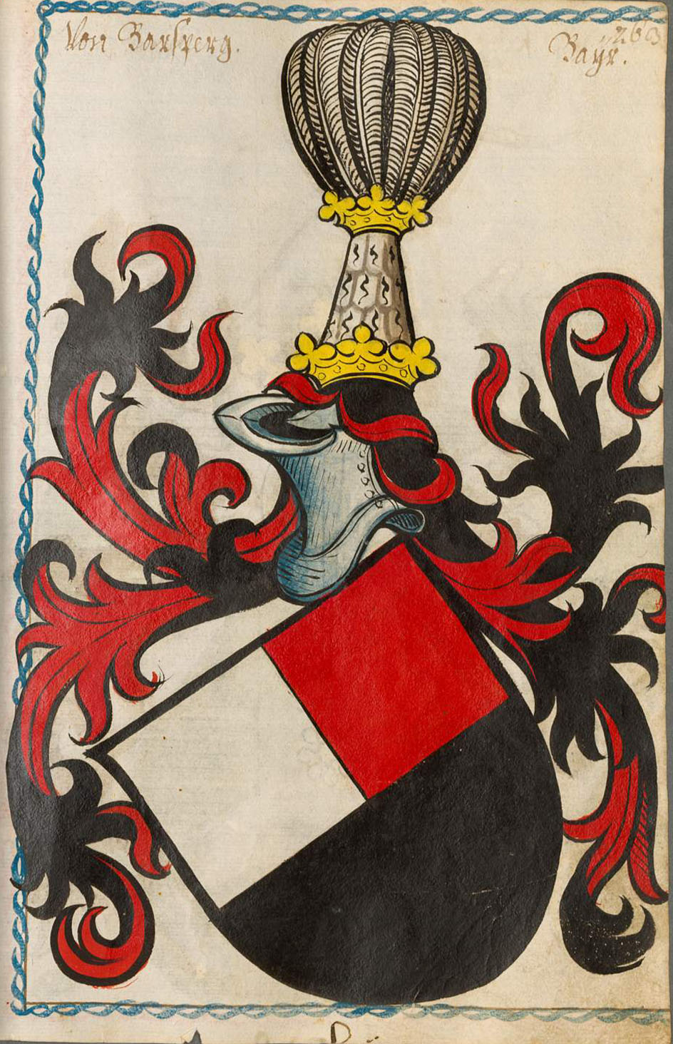 Scheibler'sches Wappenbuch , älterer Teil; Seite 263 Von Barsperg Bayern